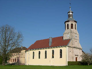 Église de Chavannes-les-Grands (Territoire de Belfort) Photo prise en mai 2004 par LP90